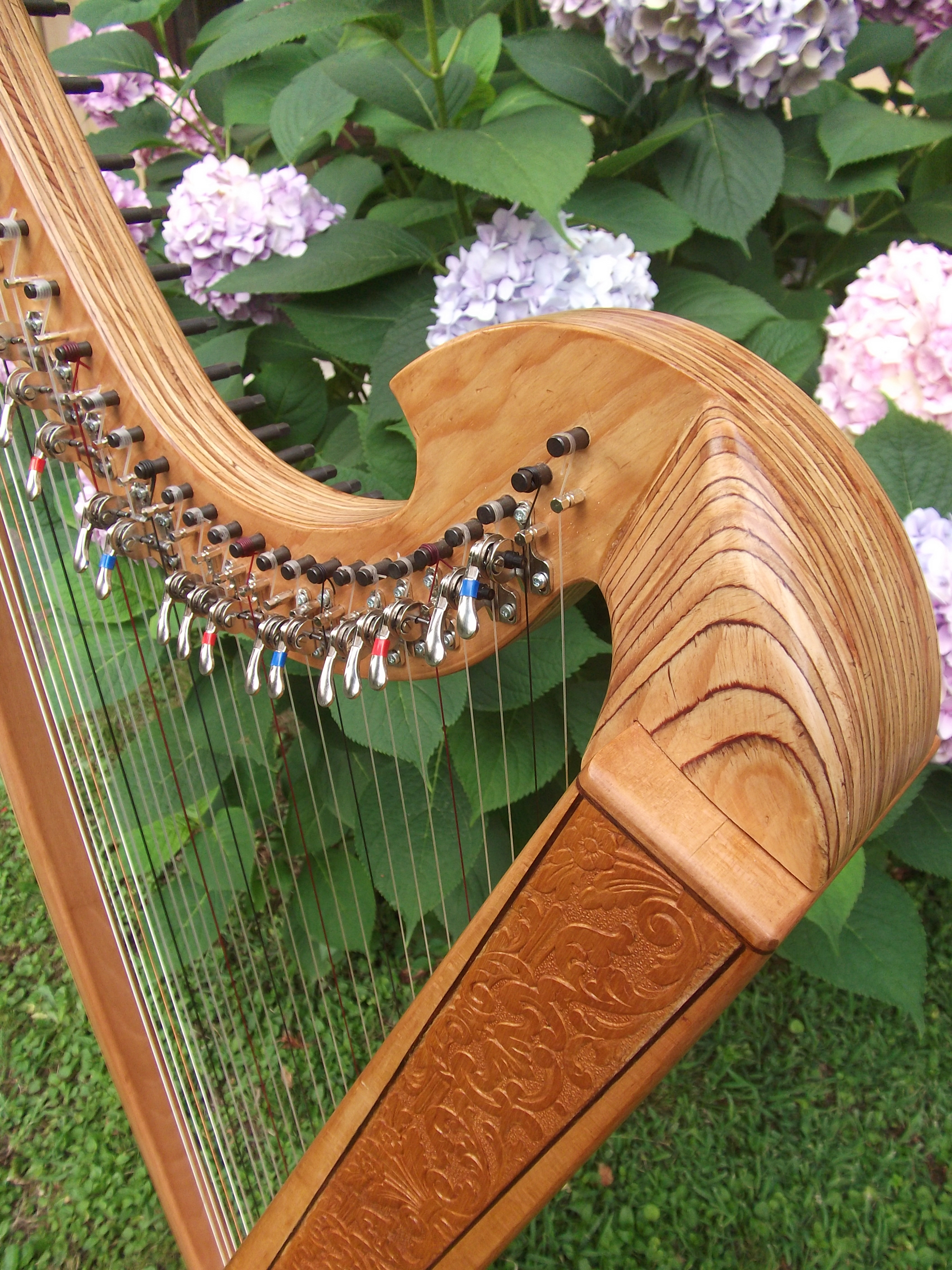 particolare 28 corde